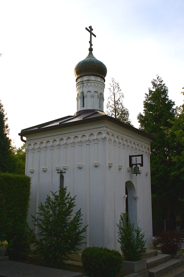 Ruska crkvica na Mirogoju u Zagrebu